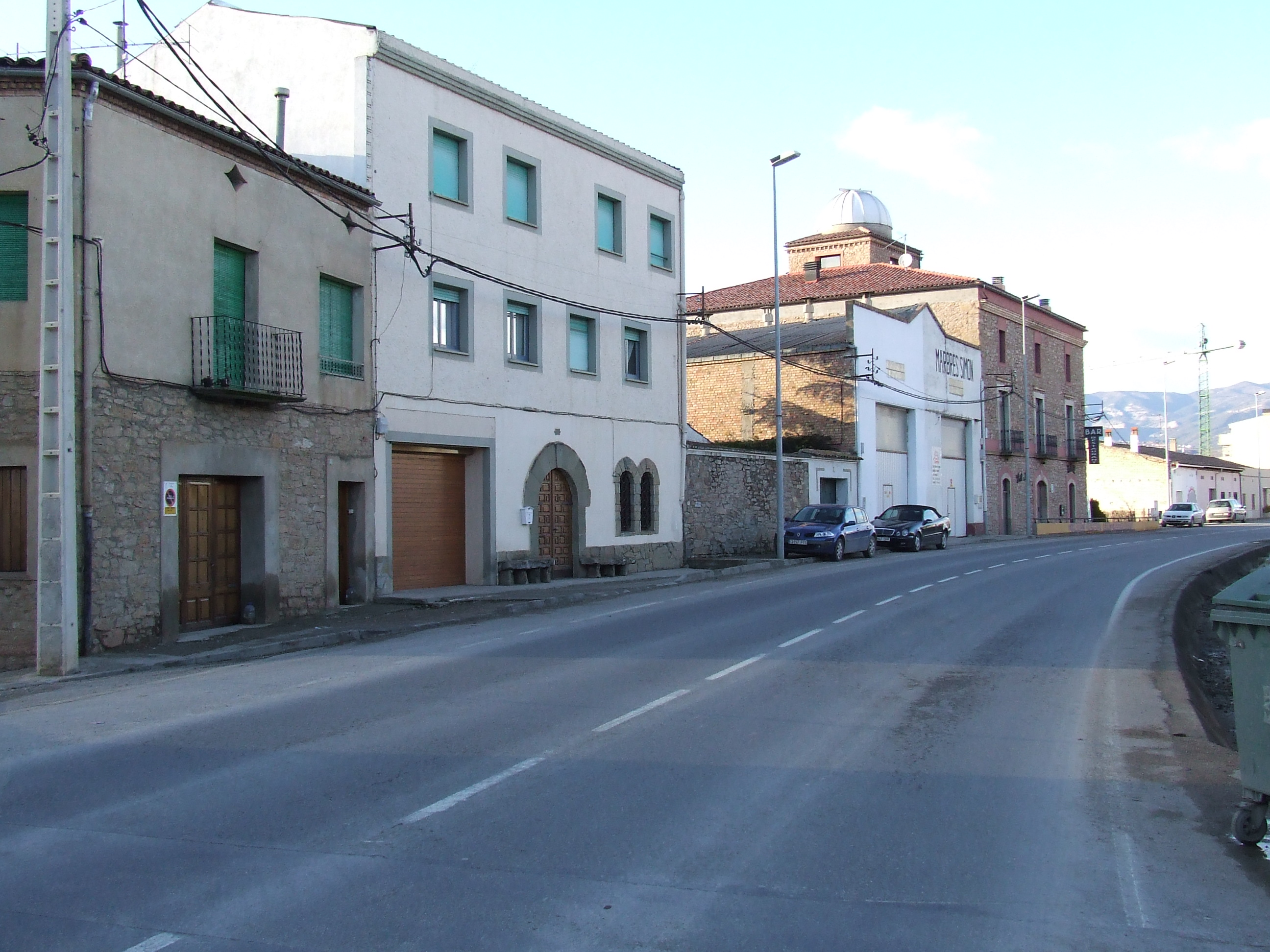 Barri de la carretera de Vilamitjana (Tremp, Pallars Jussà)